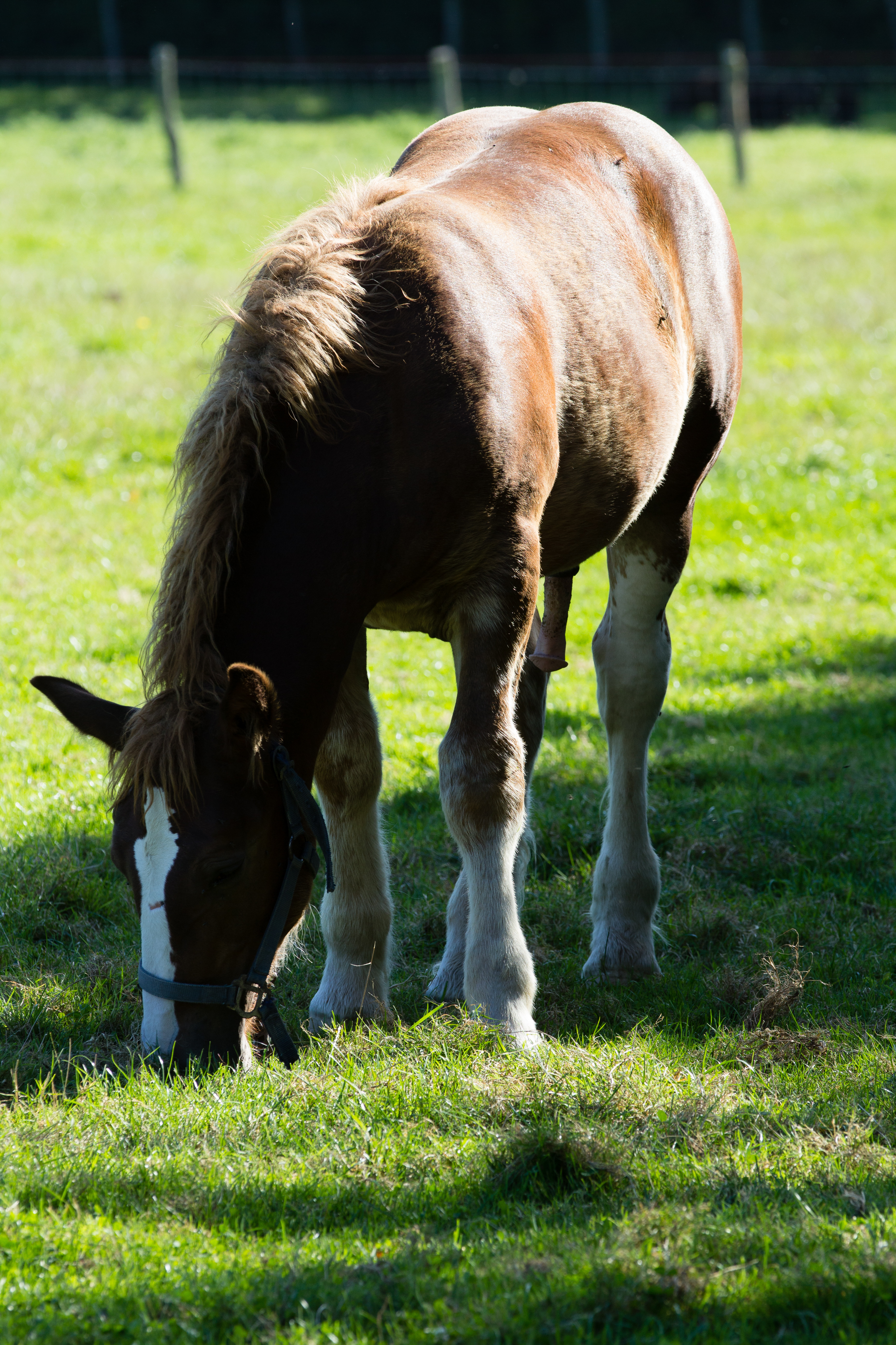 Poulain breton à l'Écomusée du pays de Rennes.